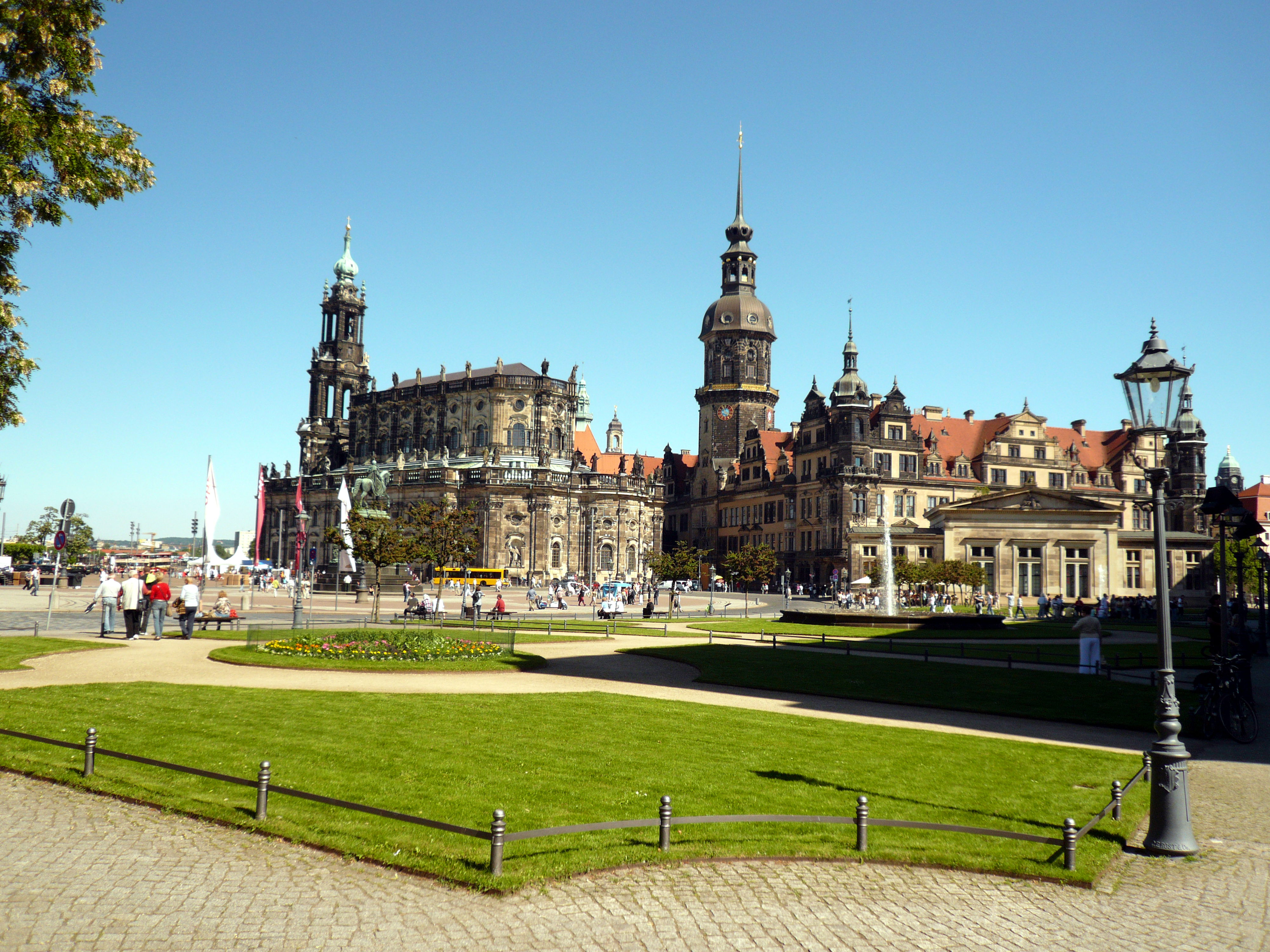 Vue de la place du Théâtre (Theater-platz) avec en second plan l'église de la Cour à Dresde, l'imposante tour Hausmann puis à droite le château à Dresde.